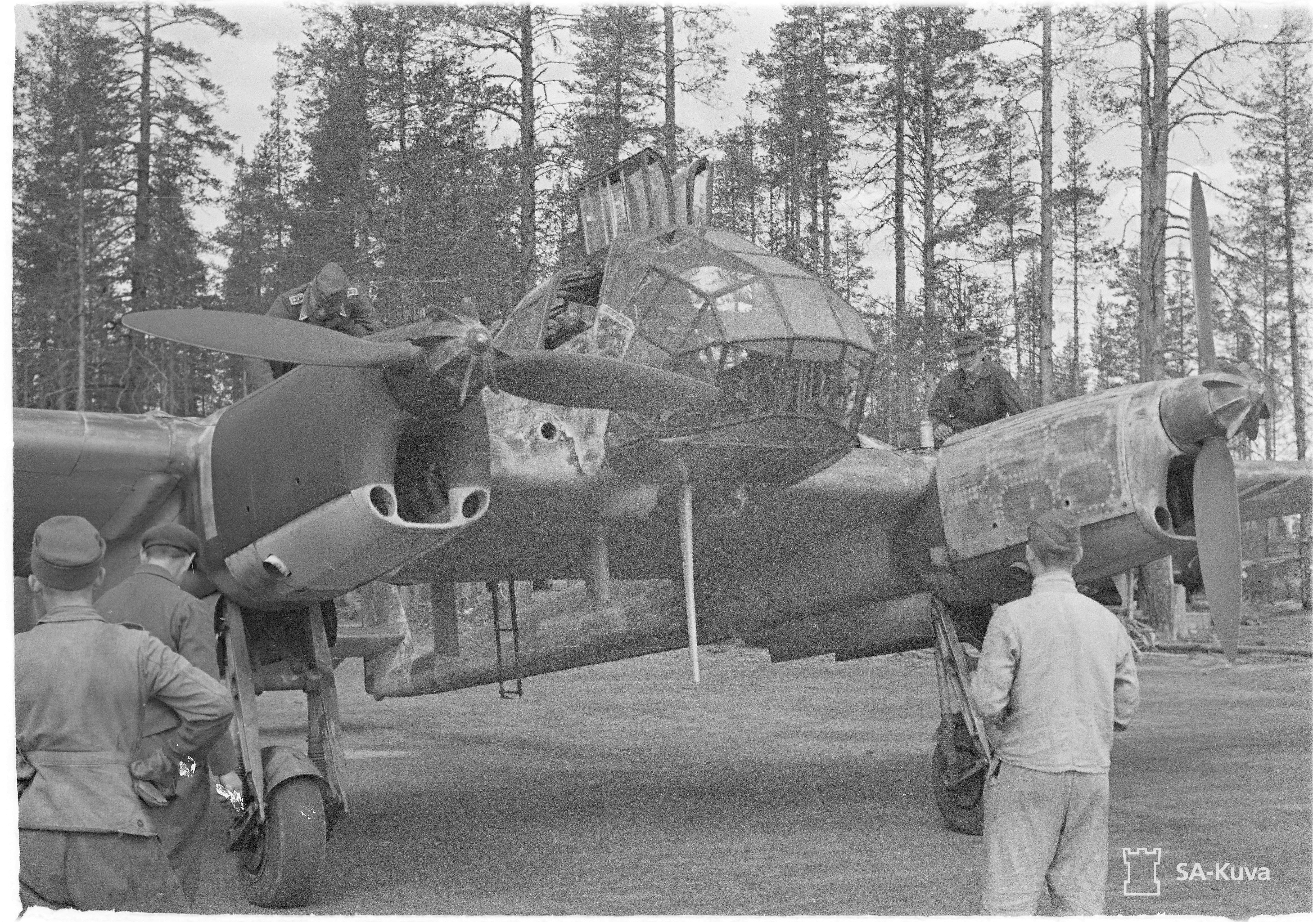 Kevyt saksalainen pommikone. (Kuvassa 1.(H)/32:n lähitiedustelukone Focke-Wulf Fw 189A-3, koneen tunnus V7+1J). Kuvauspaikka: Tiiksjärvi